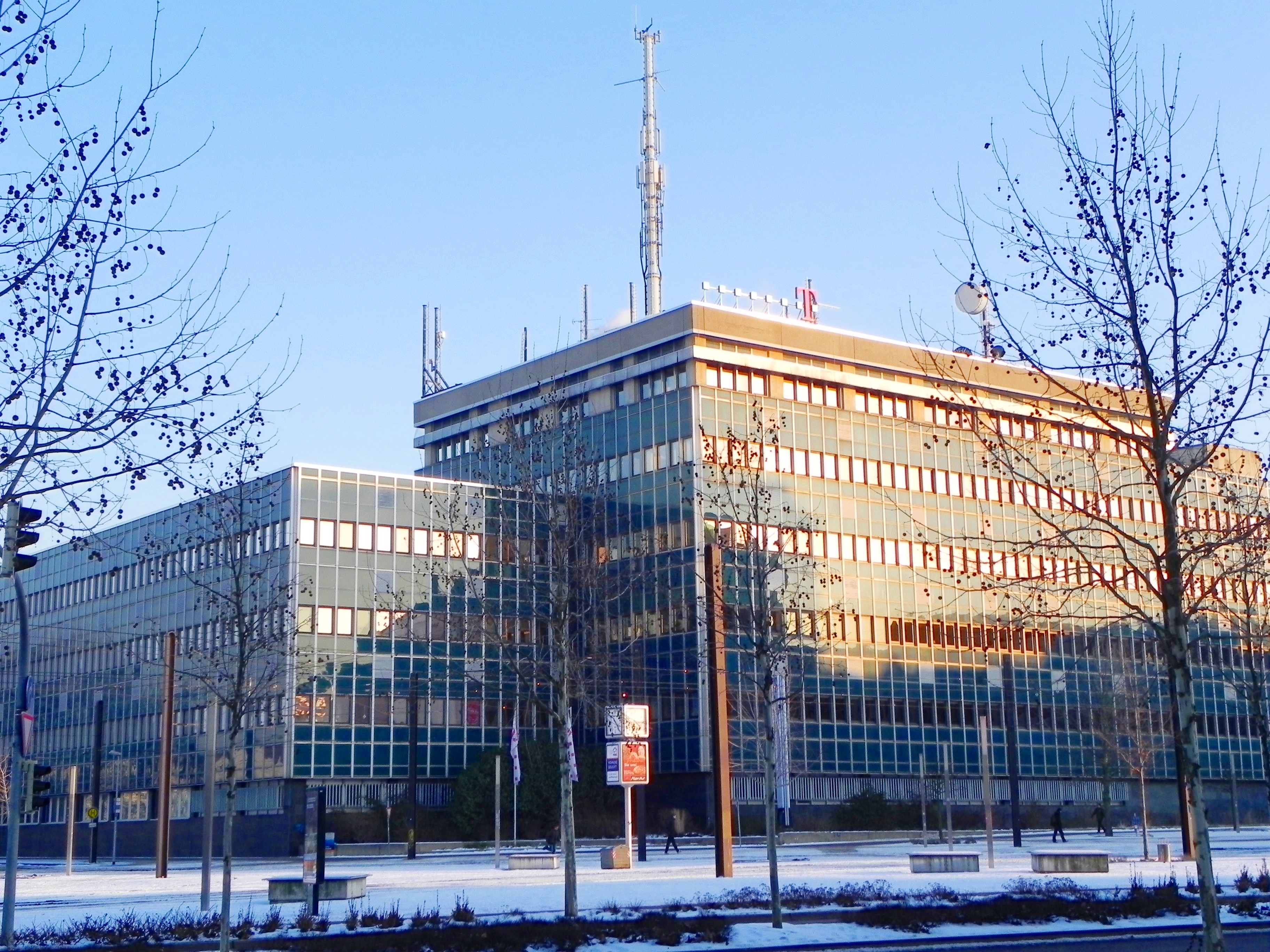 T-Systems Magdeburg